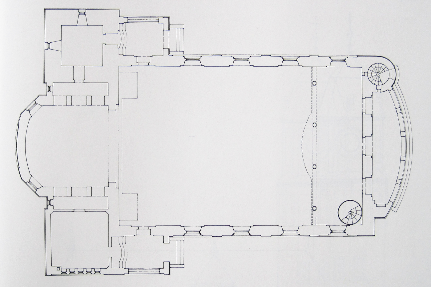 Christ-König-Kirche in Mannheim-Wallstadt